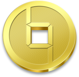 元宝币logo